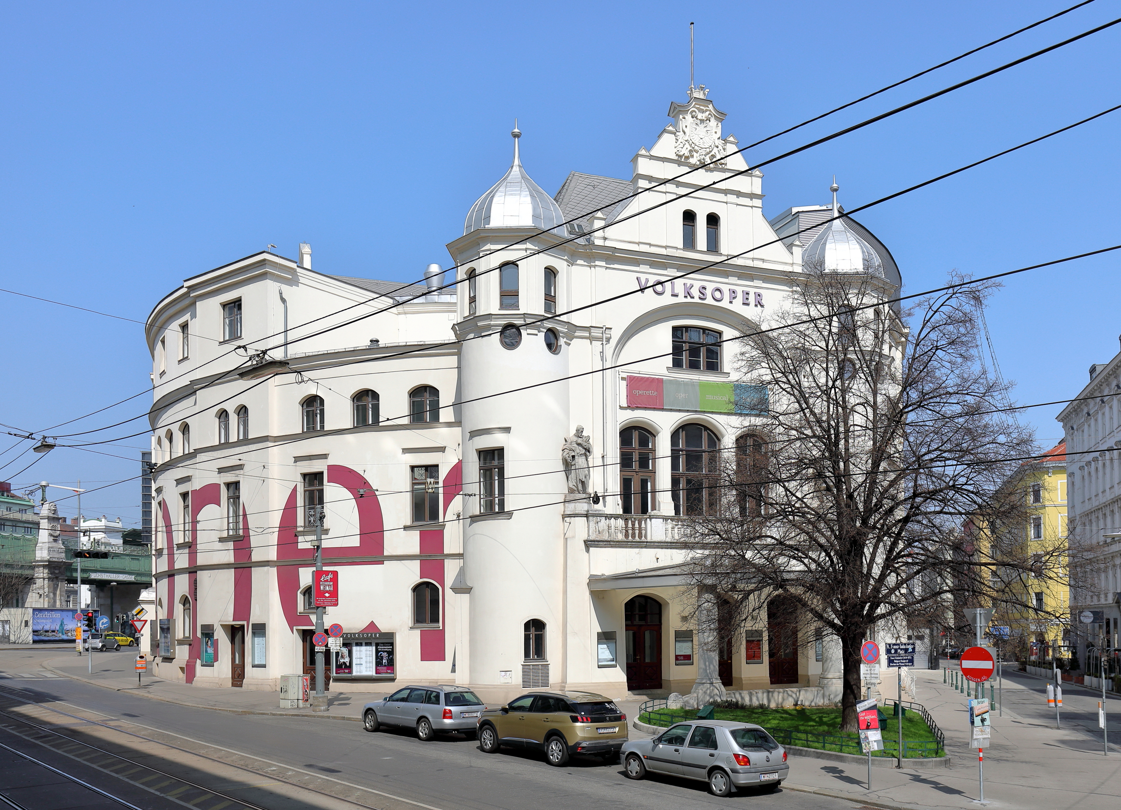 Die Volksoper in der österreichischen Bundeshauptstadt Wien. Anlässlich des 50-jährigen Regierungsjubiläums von Kaiser Franz Joseph I. wurde sie unter dem Namen "Kaiser-Jubiläums-Stadttheater" durch die Architekten Franz Freiherr von Krauss und Alexander Graf errichtet und am 14. Dezember 1898 als Sprechbühne eröffnet. Ab 1908 firmierte das Theater nur mehr unter dem Namen "Volksoper".